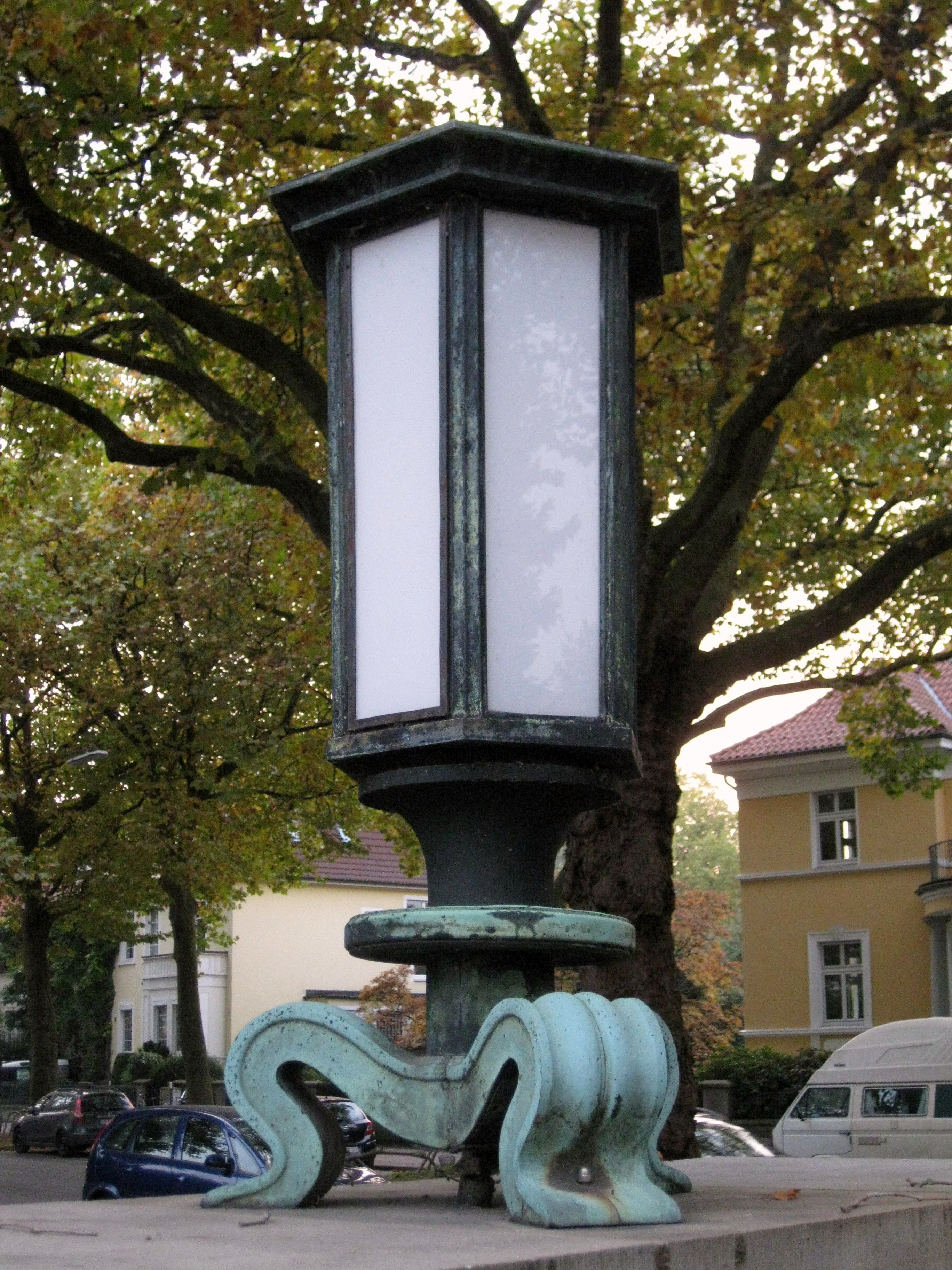 Bauen im Nationalsozialismus